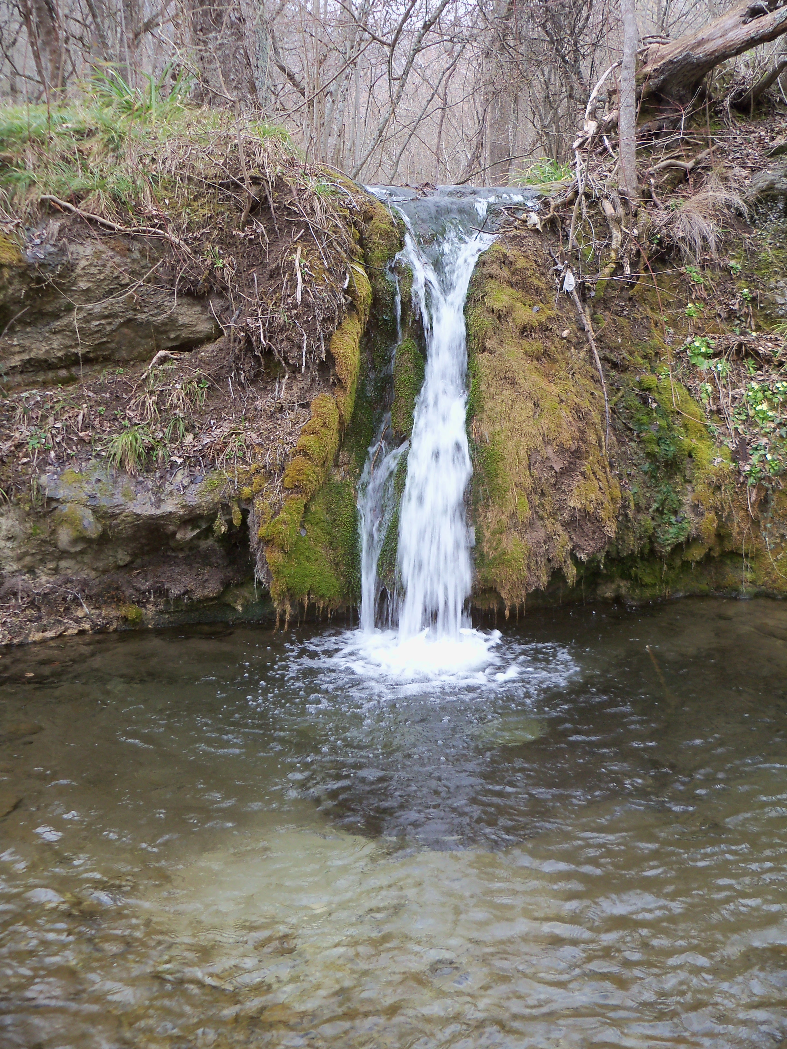 Фото